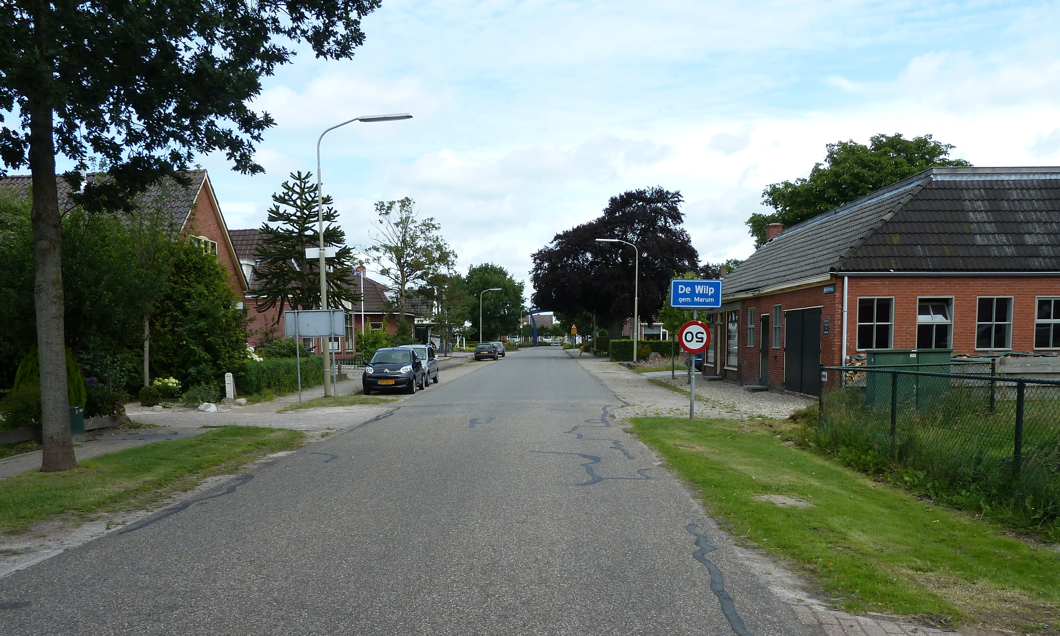 Ingang naar het dorp De Wilp vanuit het zuiden